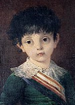 Retrato do Infante de Portugal Francisco Antônio Pio de Bragança, filho de Dom João VI e de Dona Carlota Joaquina, reis de Portugal.